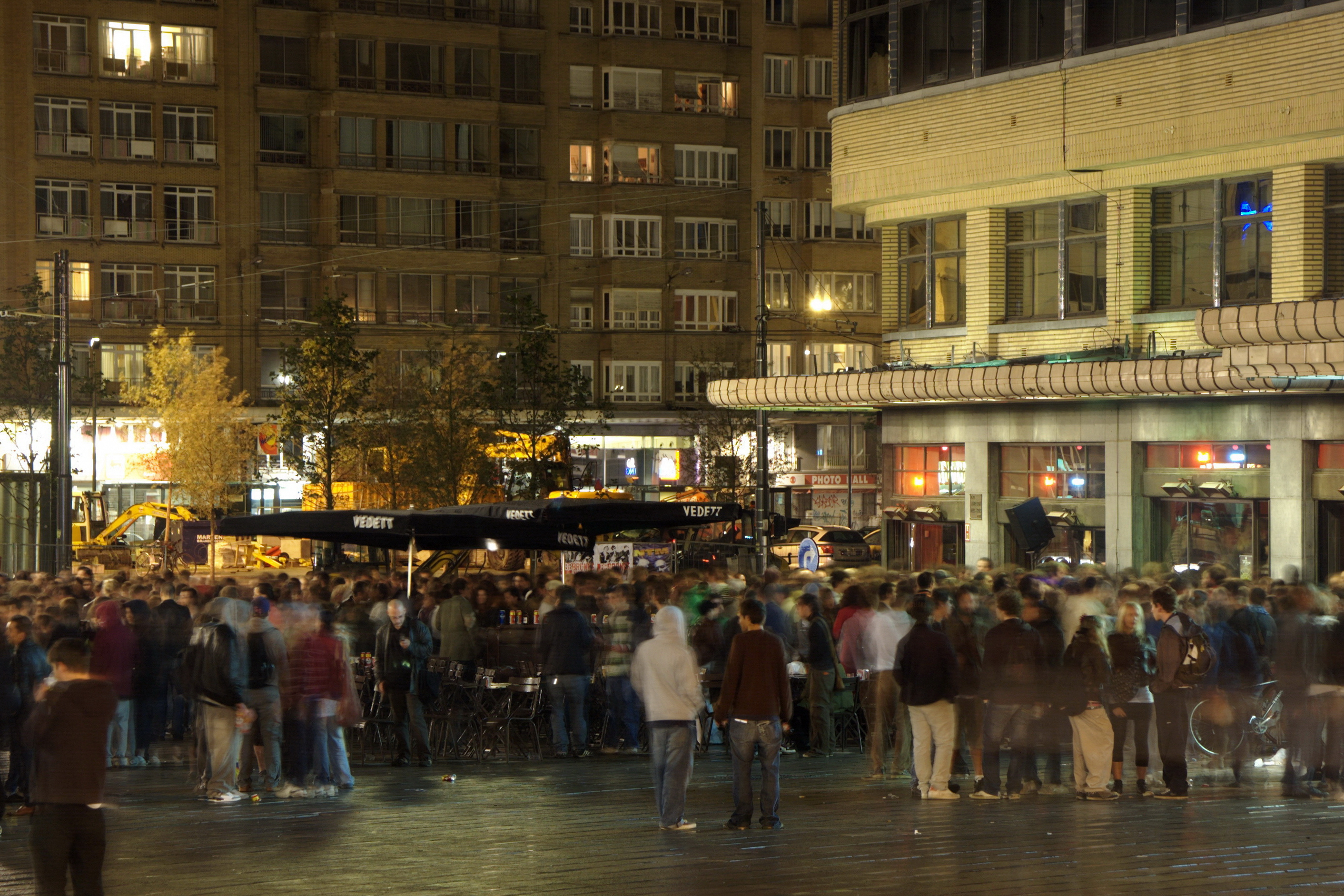 Place Eugène Flagey de nuit, Bruxelles.